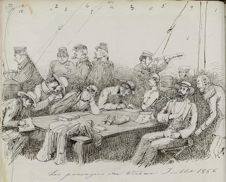 Visekongens følge ombord på dampskipet "Vidar"